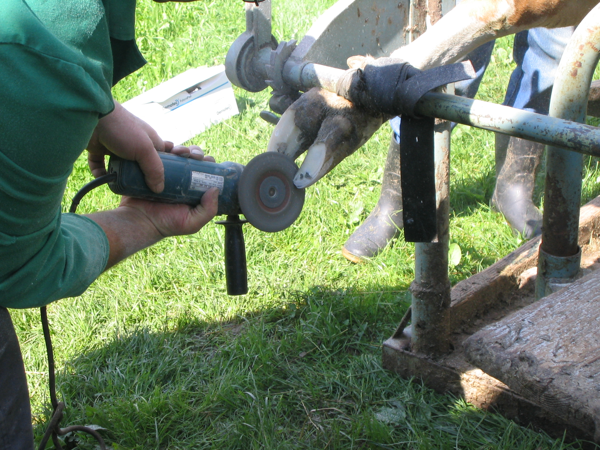 Klauenpflege beim Hausrind